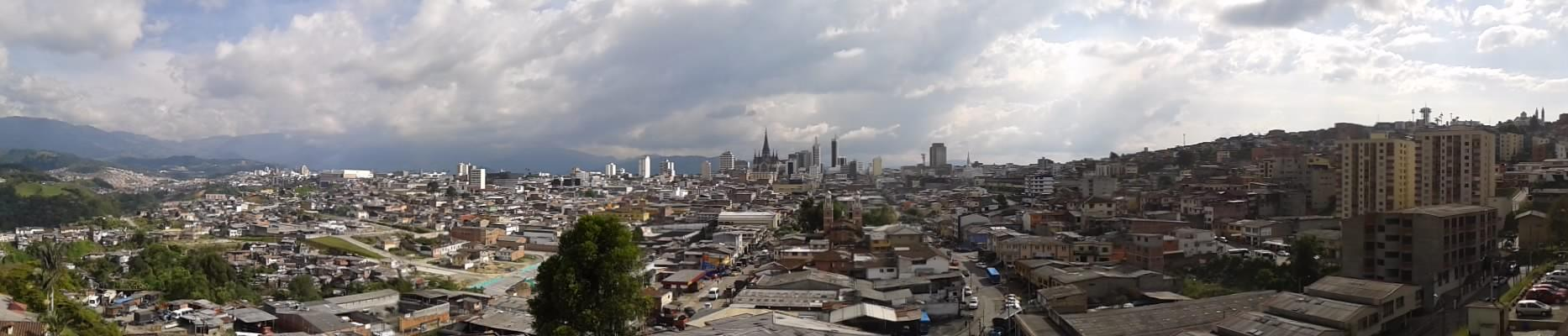 Tomada desde la Universidad de Manizales, Manizales(Colombia)